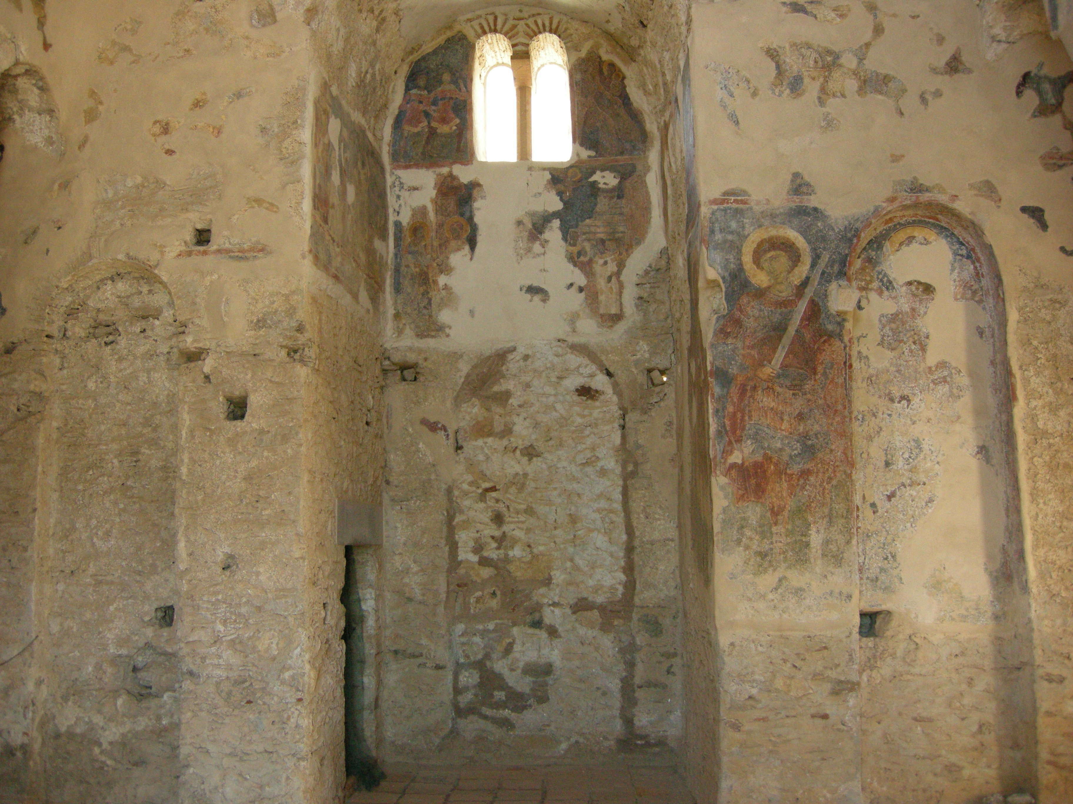 Agioi Theodoroi frescos